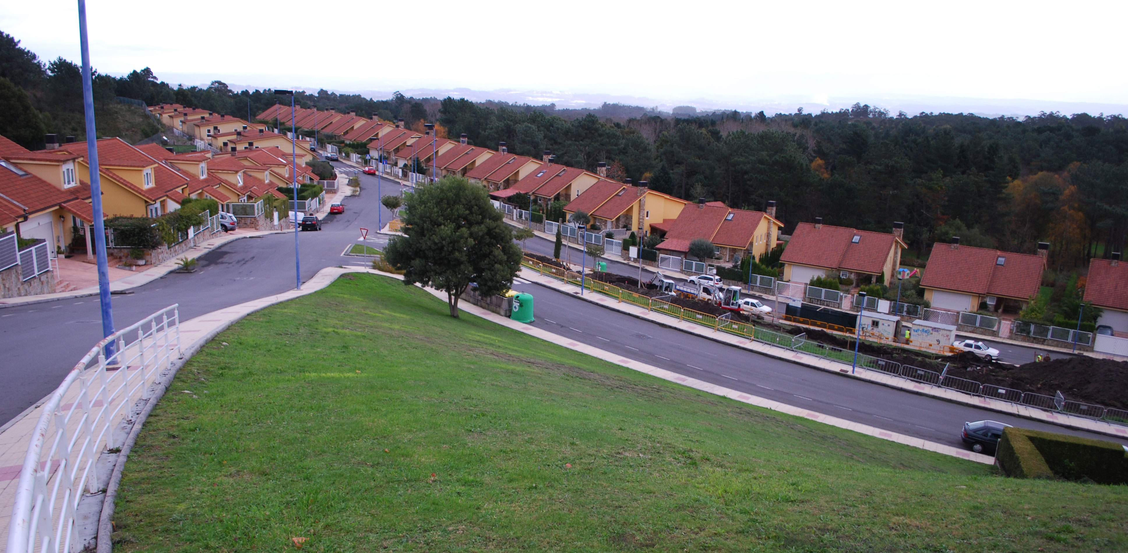 Vista da urbanización da Zapateira e campo de golf Arteixo A Coruña Galiza Spain